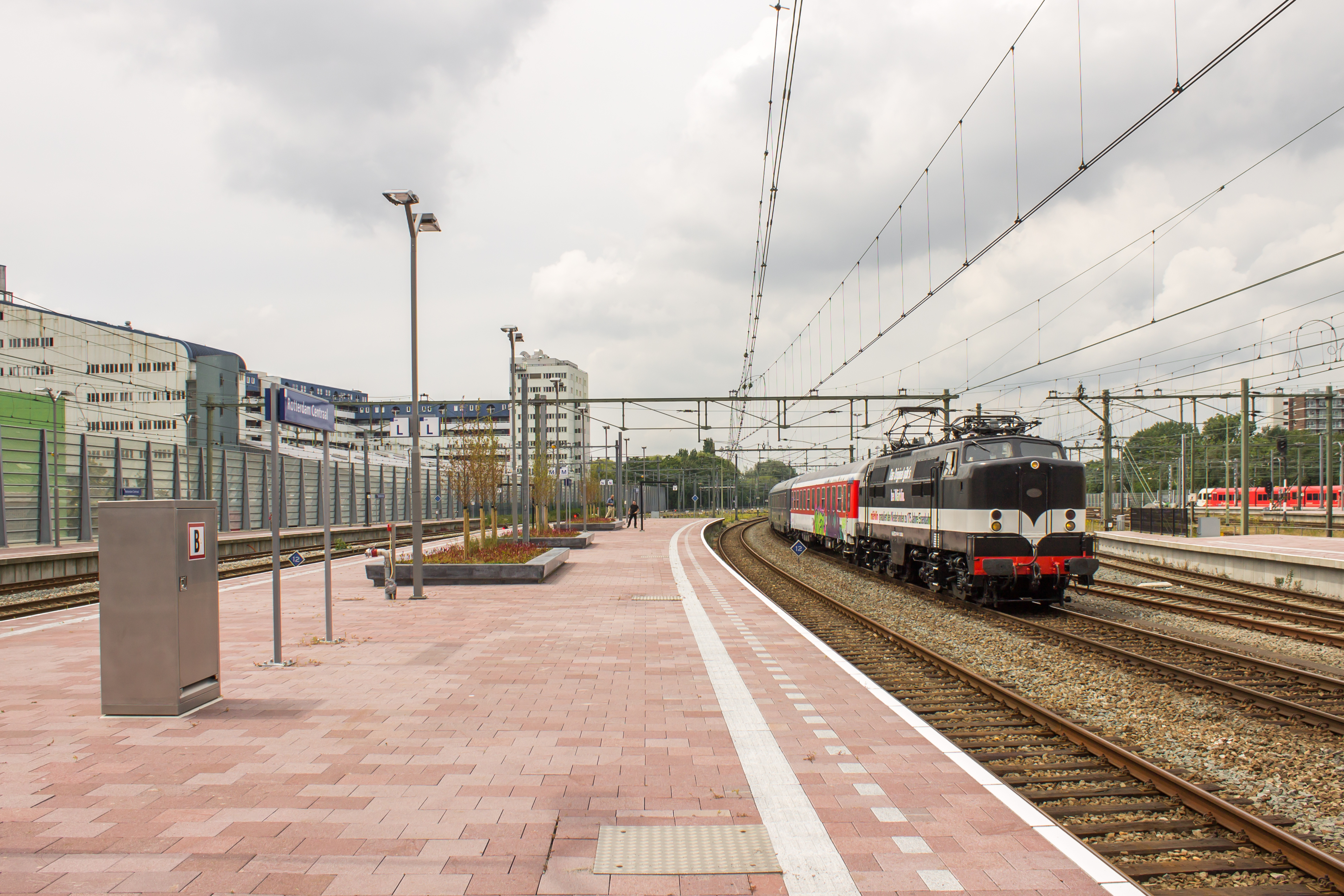 Het lege materieel van de AutoSlaapTreinen rijdt op vrijdagen in drie uur met drie treinen van de Watergraafsmeer naar 's Hertogenbosch. De route loopt dan via Woerden, Gouda, Rotterdam en Breda. Omdat er weer drie AST's rijden, worden er ook drie LM-ritten ingepland. Hier komt EETC's 1252, de Märklin-reclameloc, binnen op het Rotterdamse 'Centraal Station', om rustig richting Dordrecht en 's Hertogenbosch te rijden.